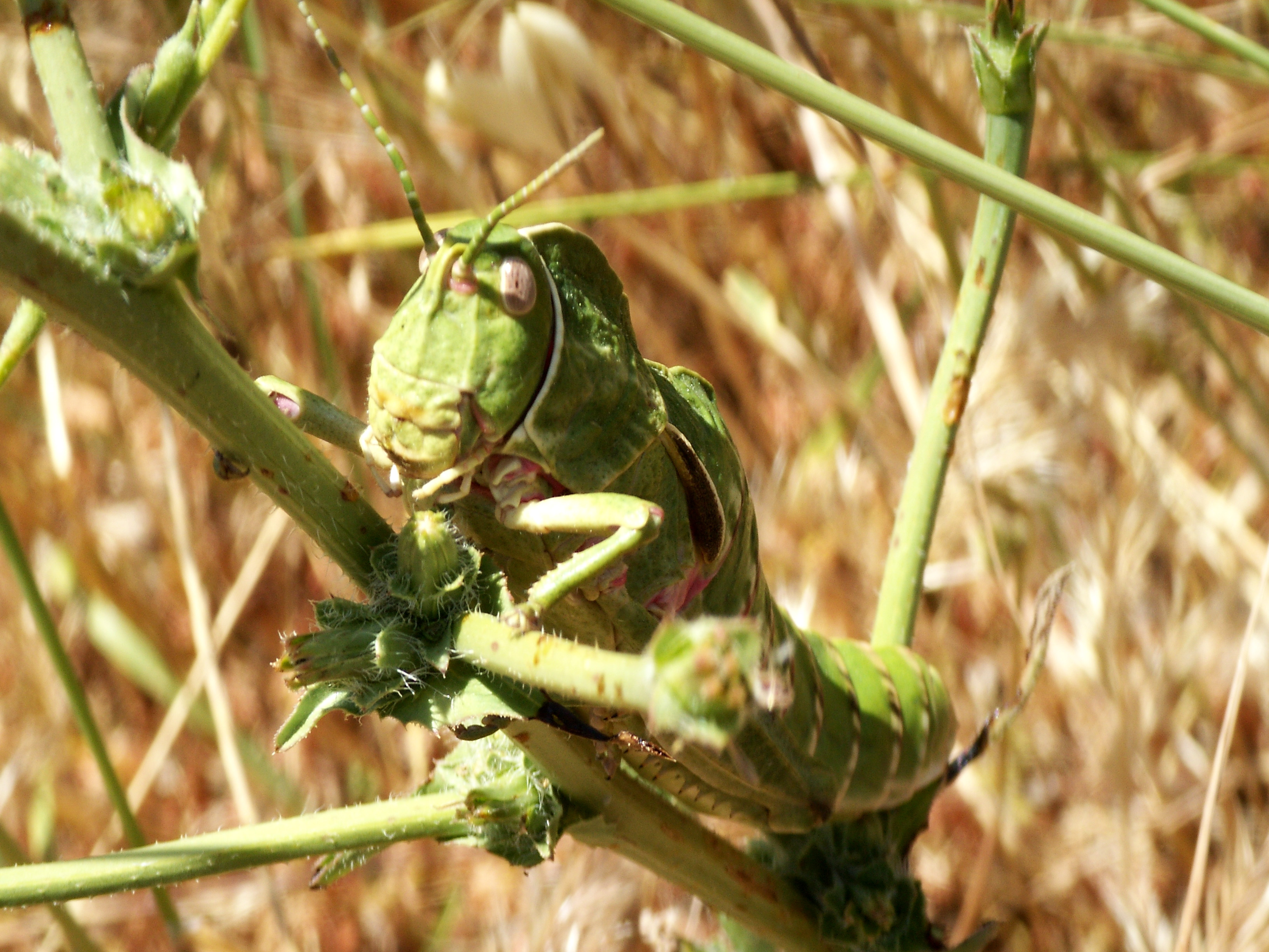 Pamphagus sp., a Nureci (OR), Sardegna. Verosimilmente Pamphagus sardeus, unica specie presente in Sardegna.